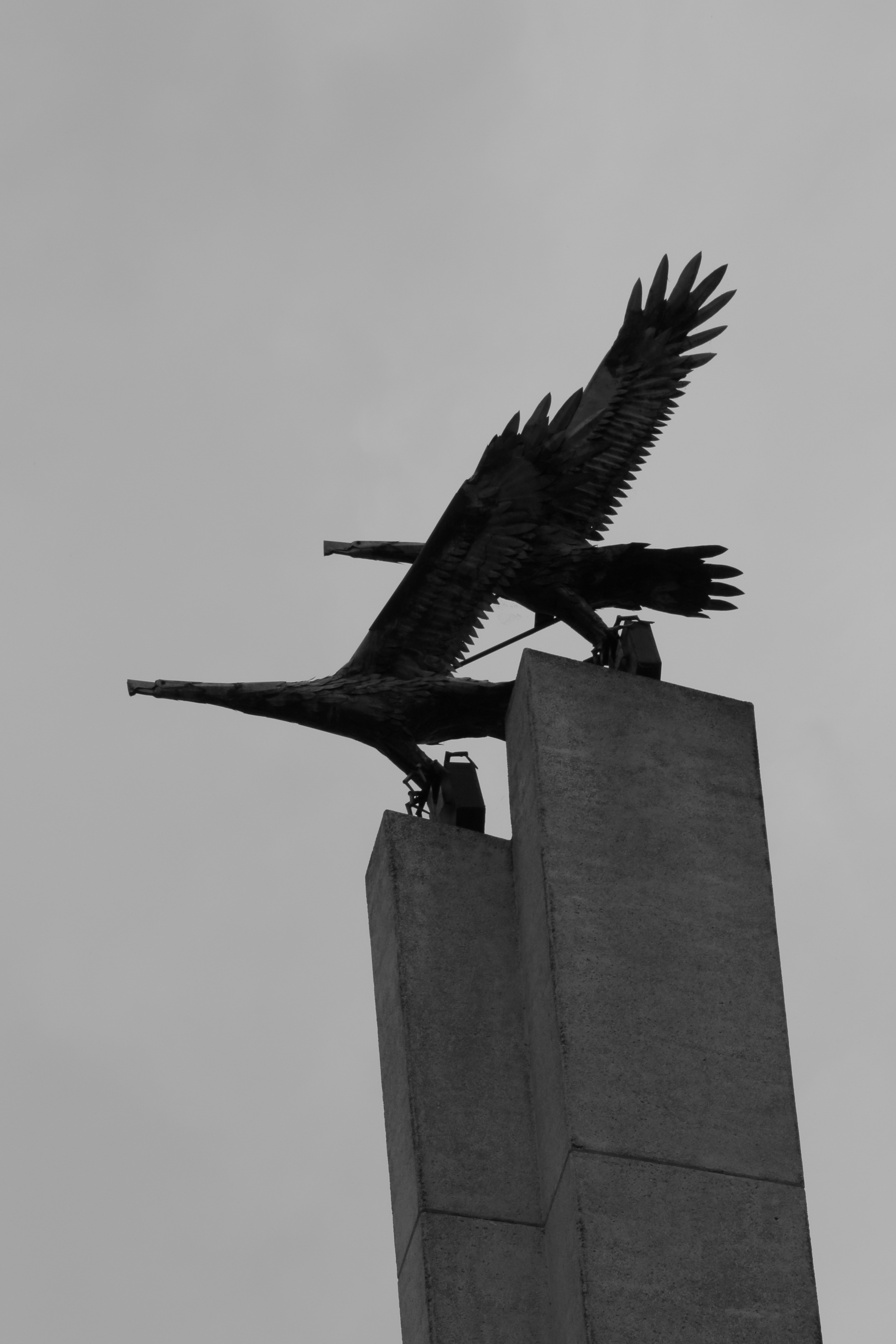 Jagdfliegerehrenmal (Fliegerdenkmal) zum Gedenken an die toten Jagdflieger aller Völker nach Plänen des Bildhauers Klaus Seelenmeyer. Einweihung am 17. Oktober 1959. Rheinanlagen, Geisenheim im Rheingau.